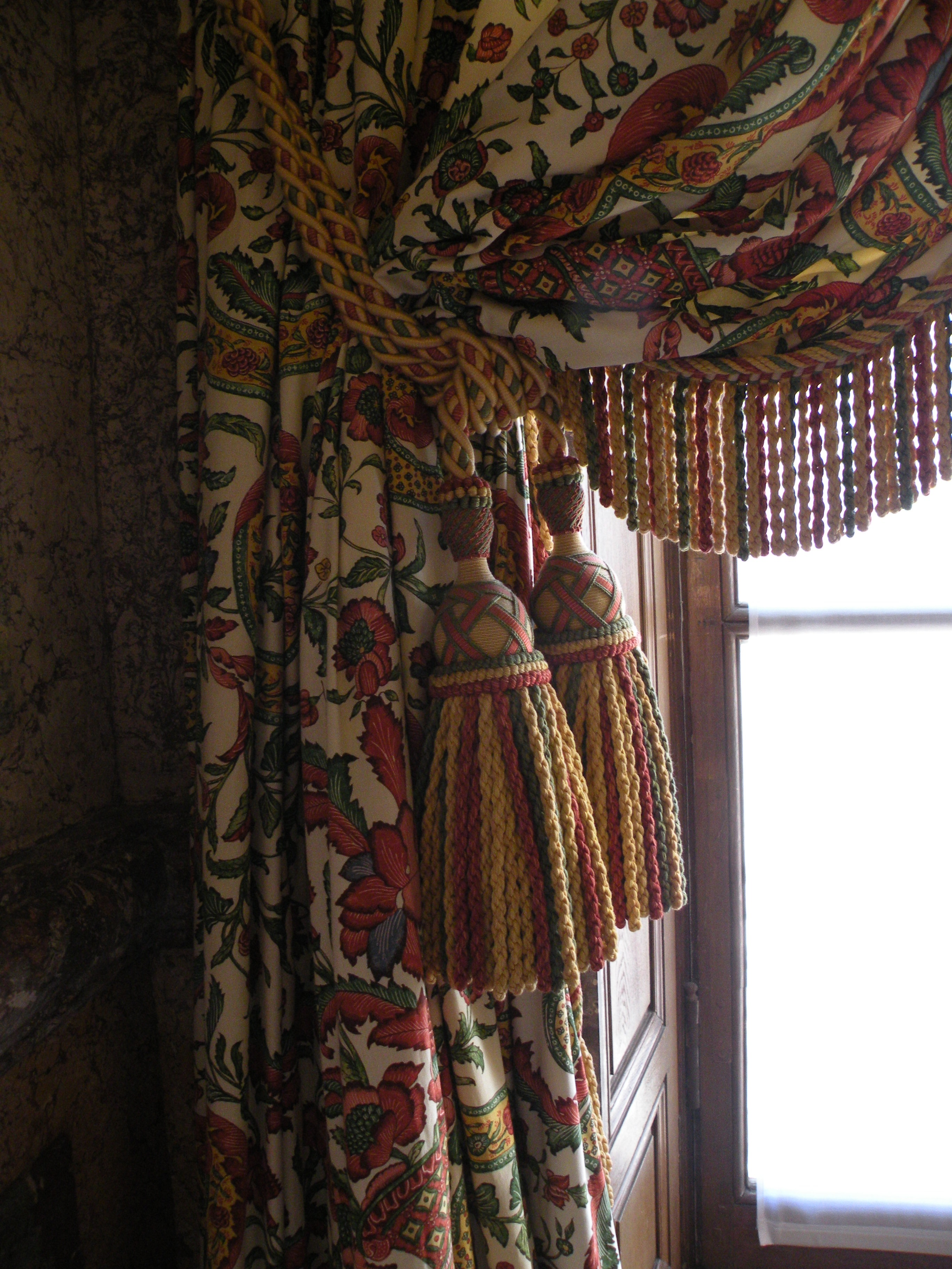 passementerie du salon des stucs